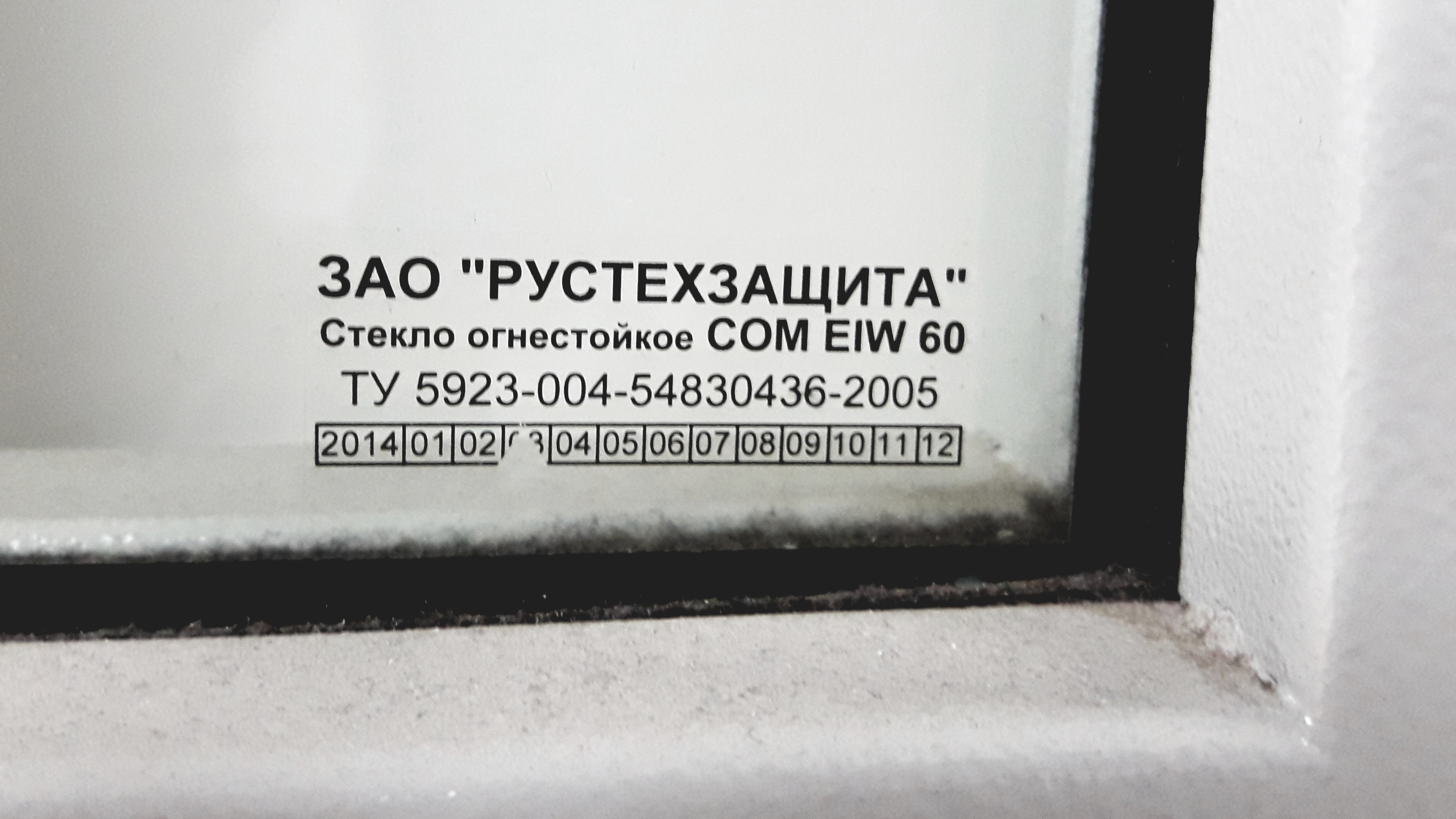 Огнеатойкое стекло